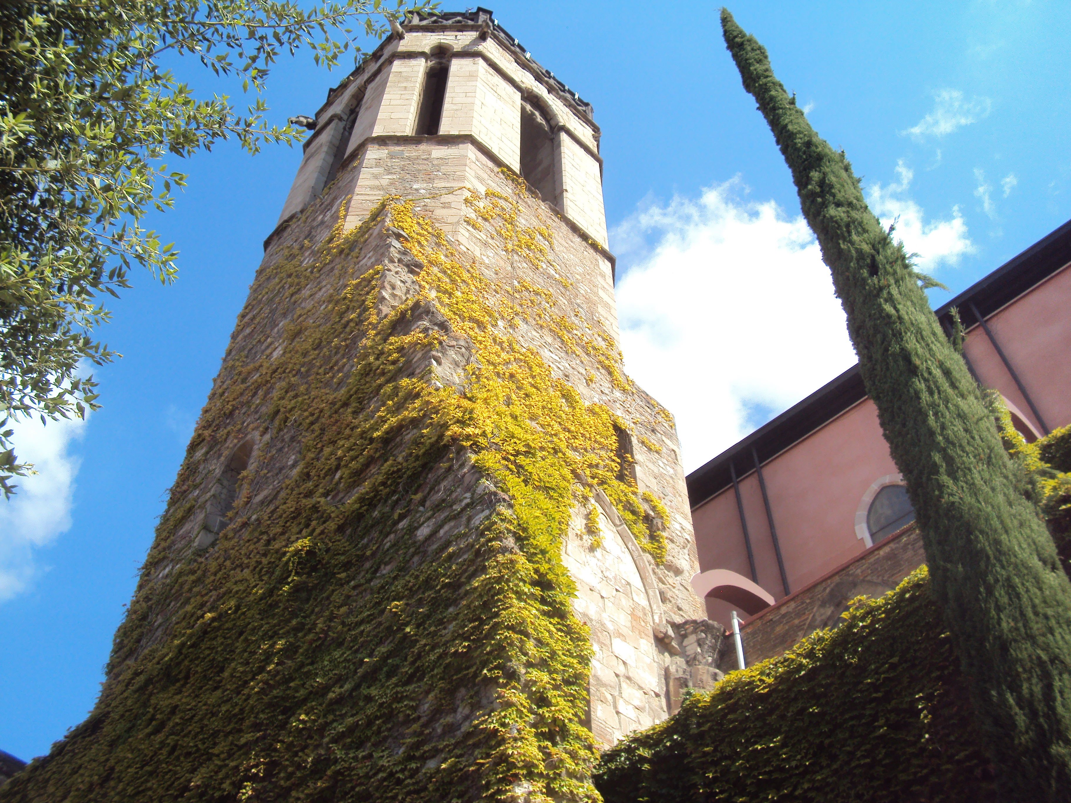 Campanar de l'església parroquial de Sant Esteve (Granollers)